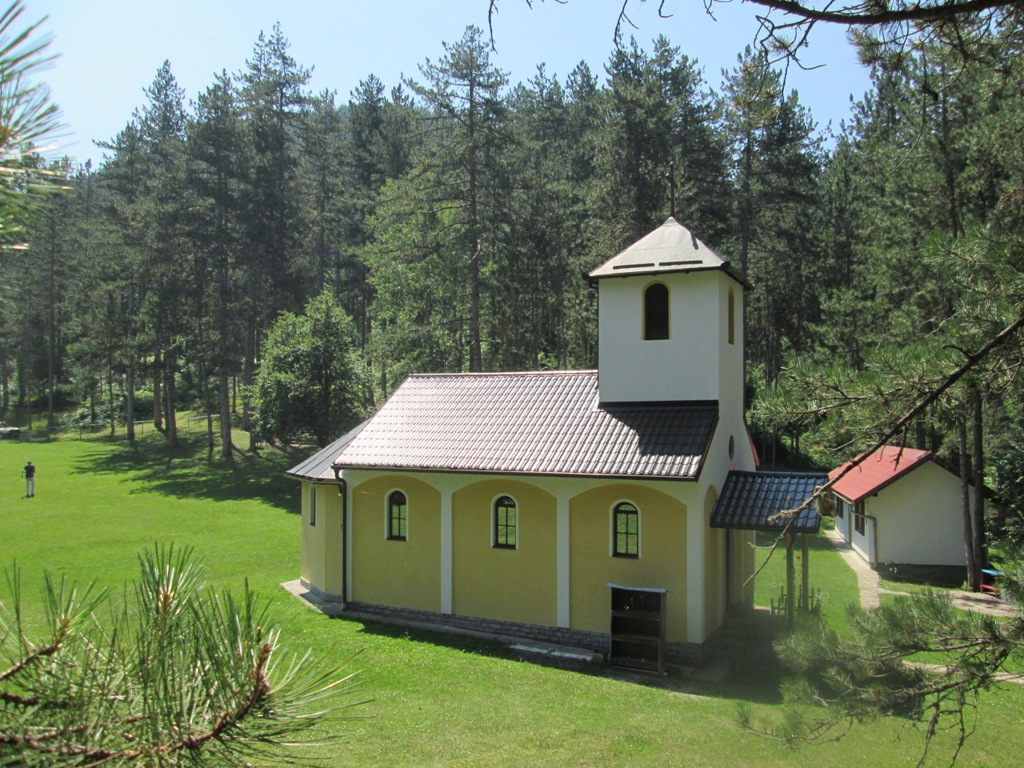 This image was uploaded as part of Trace of Soul 2015.